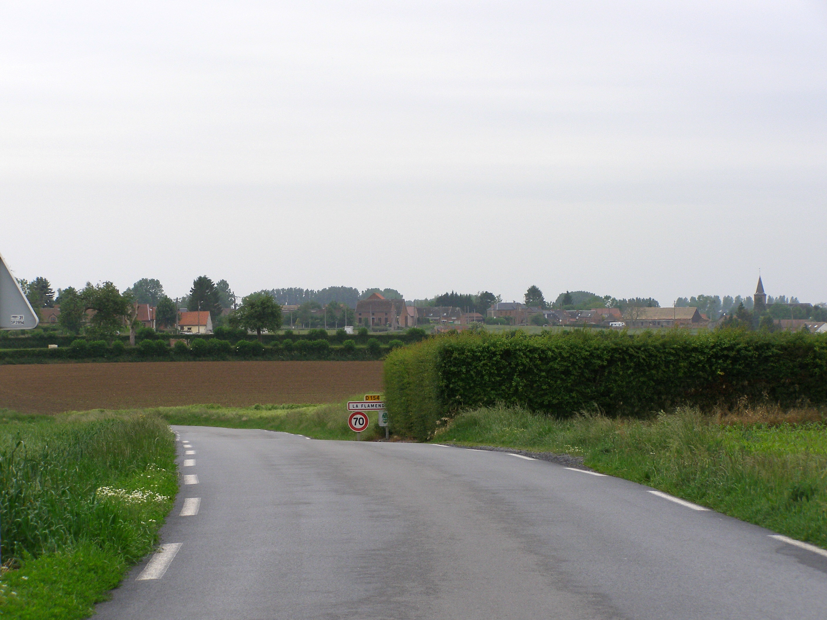 Vue d'ensemble.